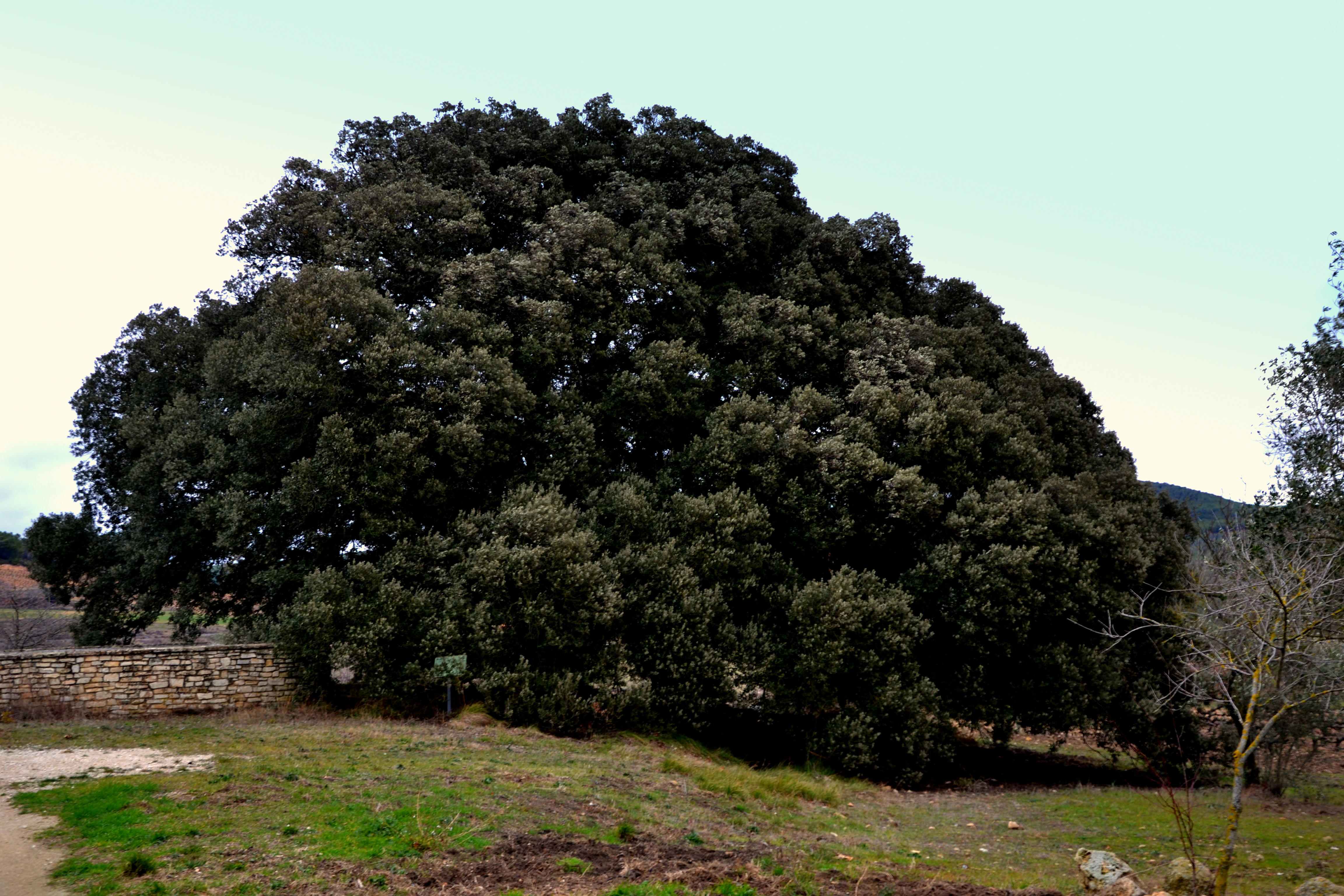 Alzina de la Casa Nova de Bonany (Querol) This is a a photo of a protected or outstanding tree in Catalonia, Spain, with id: MA-01.120.01